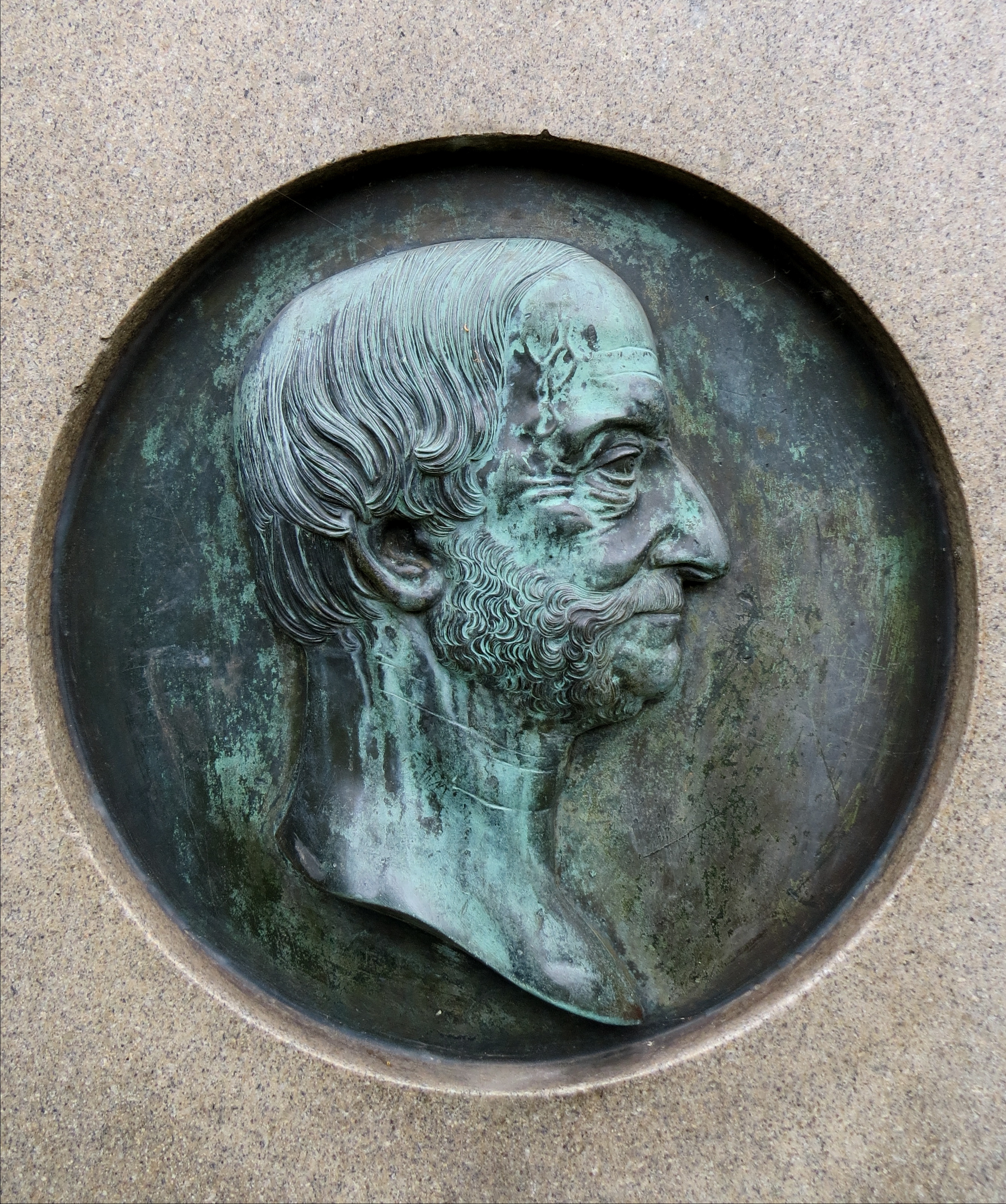 Medaillonportræt fra 1862 forestillende Eggert Christopher Frederik baron Løvenskiold (1788–1861) af billedhugger Niels Waldemar Fjeldskov (1826–1903), fra monument i Kongelunden, Amager